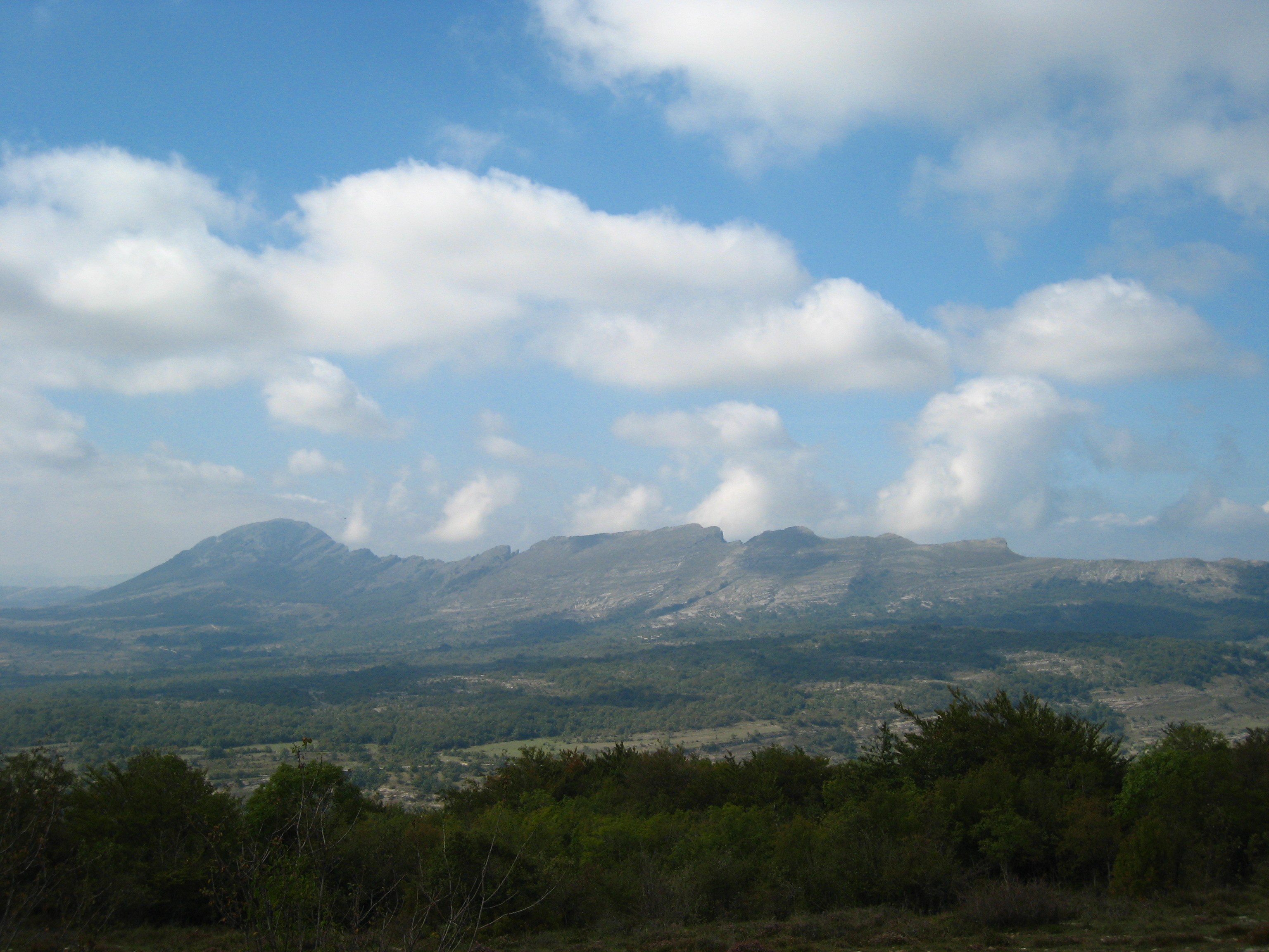 Vista del Valle de Losa, Burgos.